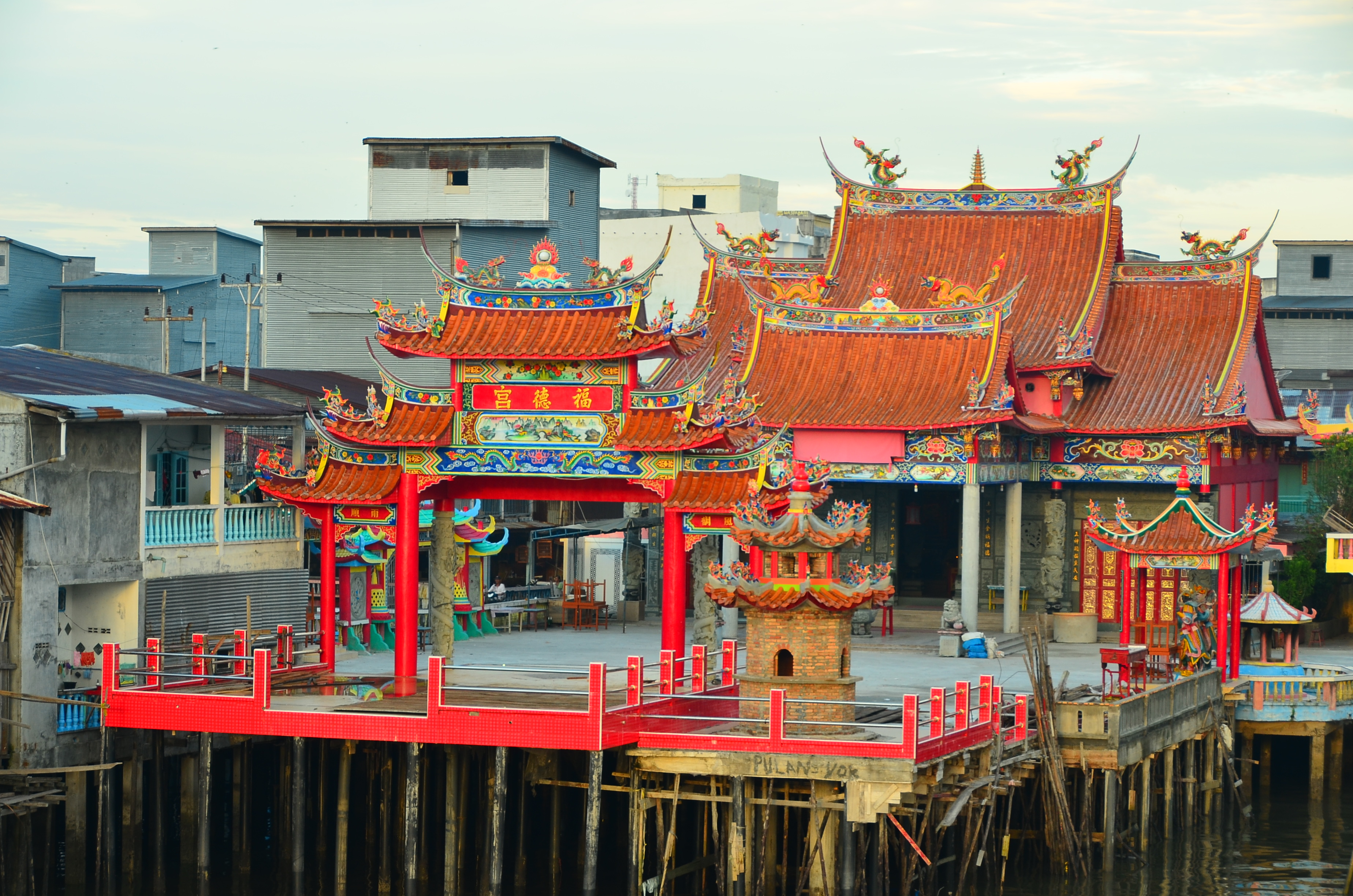 Kelenteng Hock Tek Keng (tua keng Panipahan)